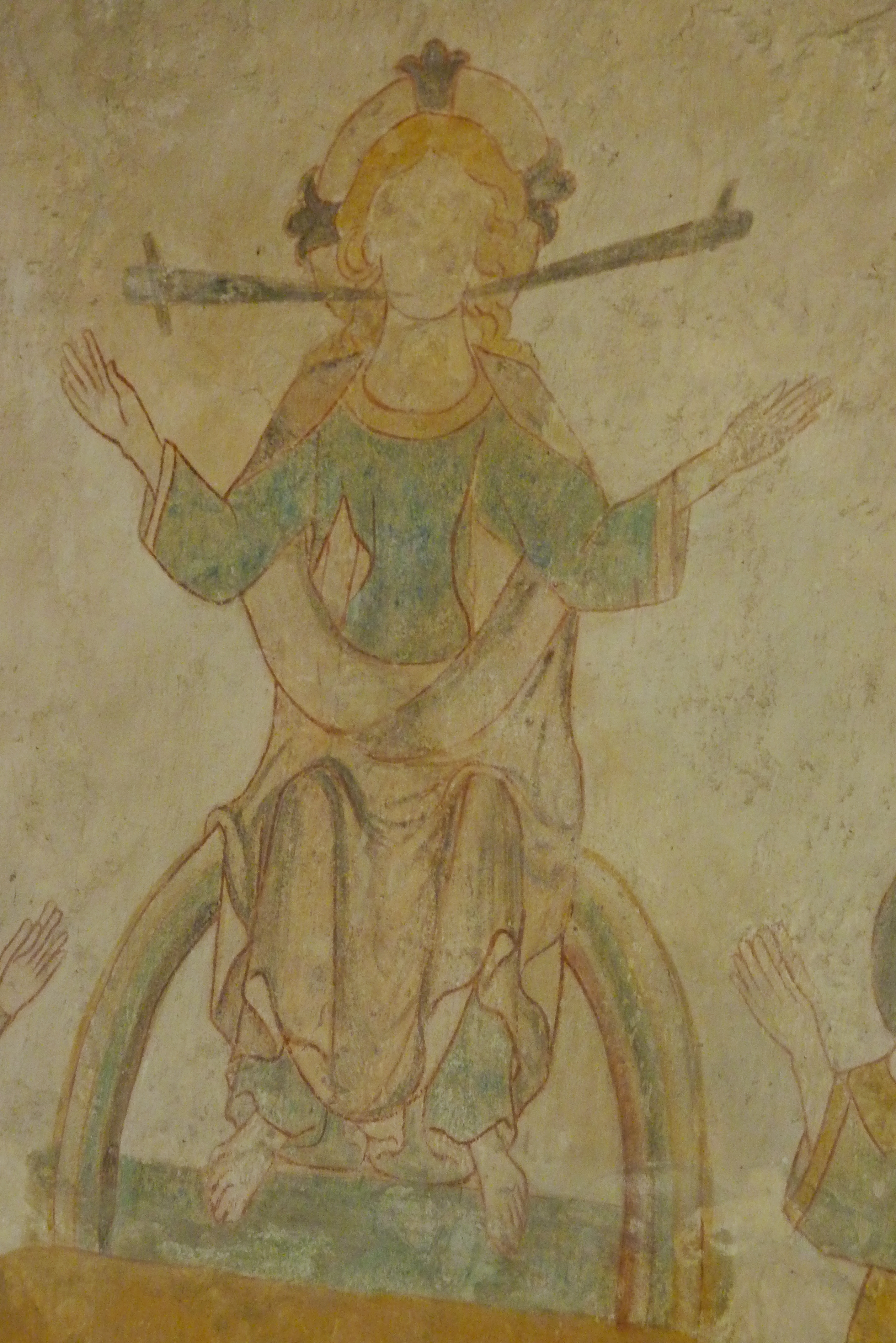 Gotische Wandmalerei in der Peterskapelle in Spay, Darstellung: Christus als Weltenrichter